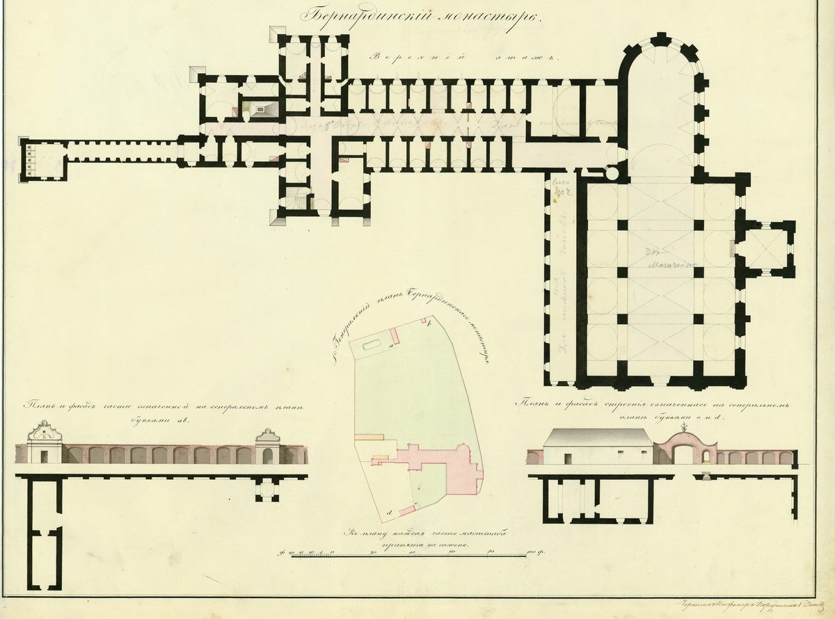 Ф. 349. Главное военно-техническое управление. Оп. 4. Д. 147. План Бернардинского монастыря. Дата: 1830 год. Кол-во листов: 1 60 х 60 см М: в 1 дюйме 20 футов